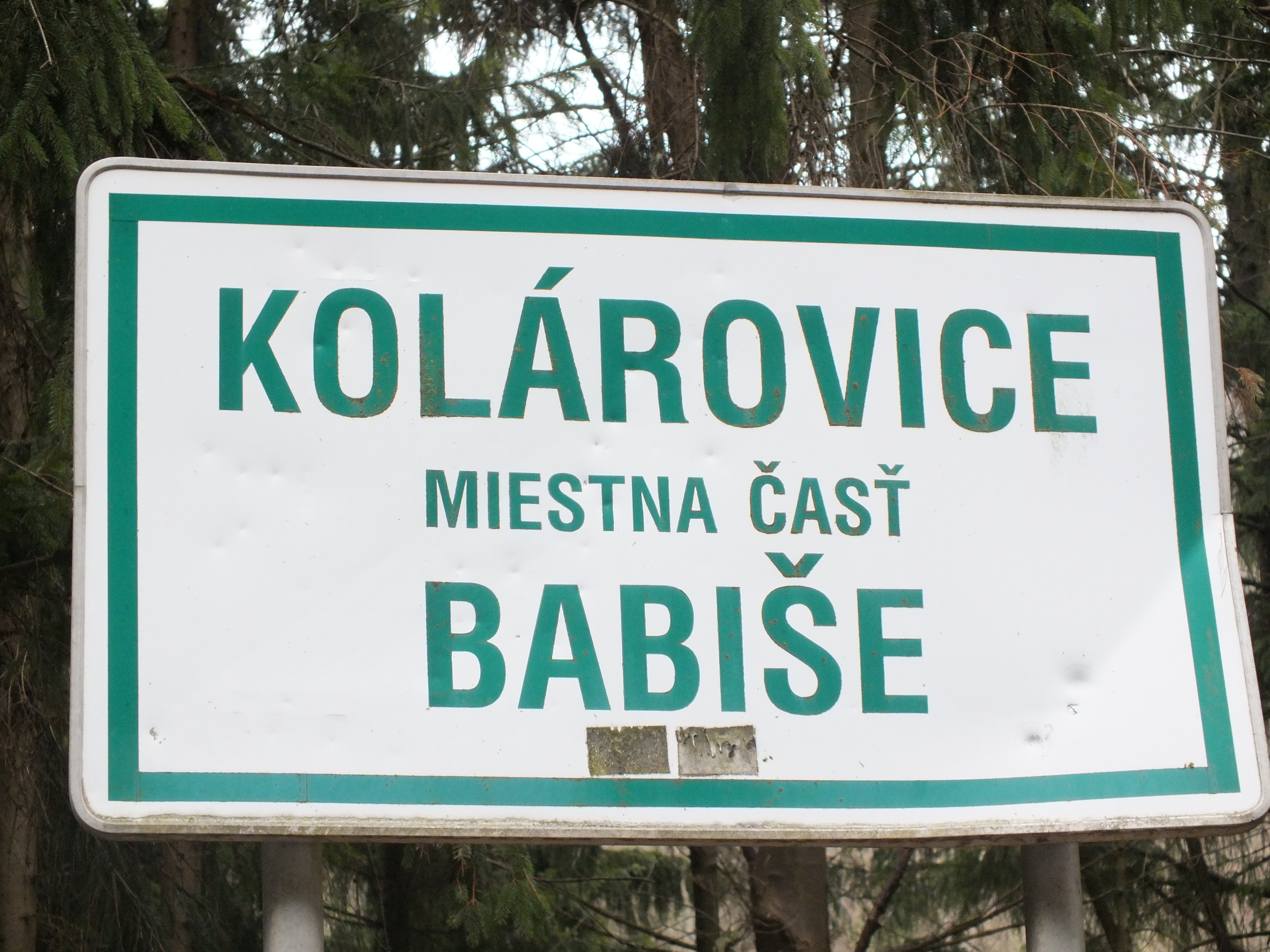 Kolárovice, místní část Babiše